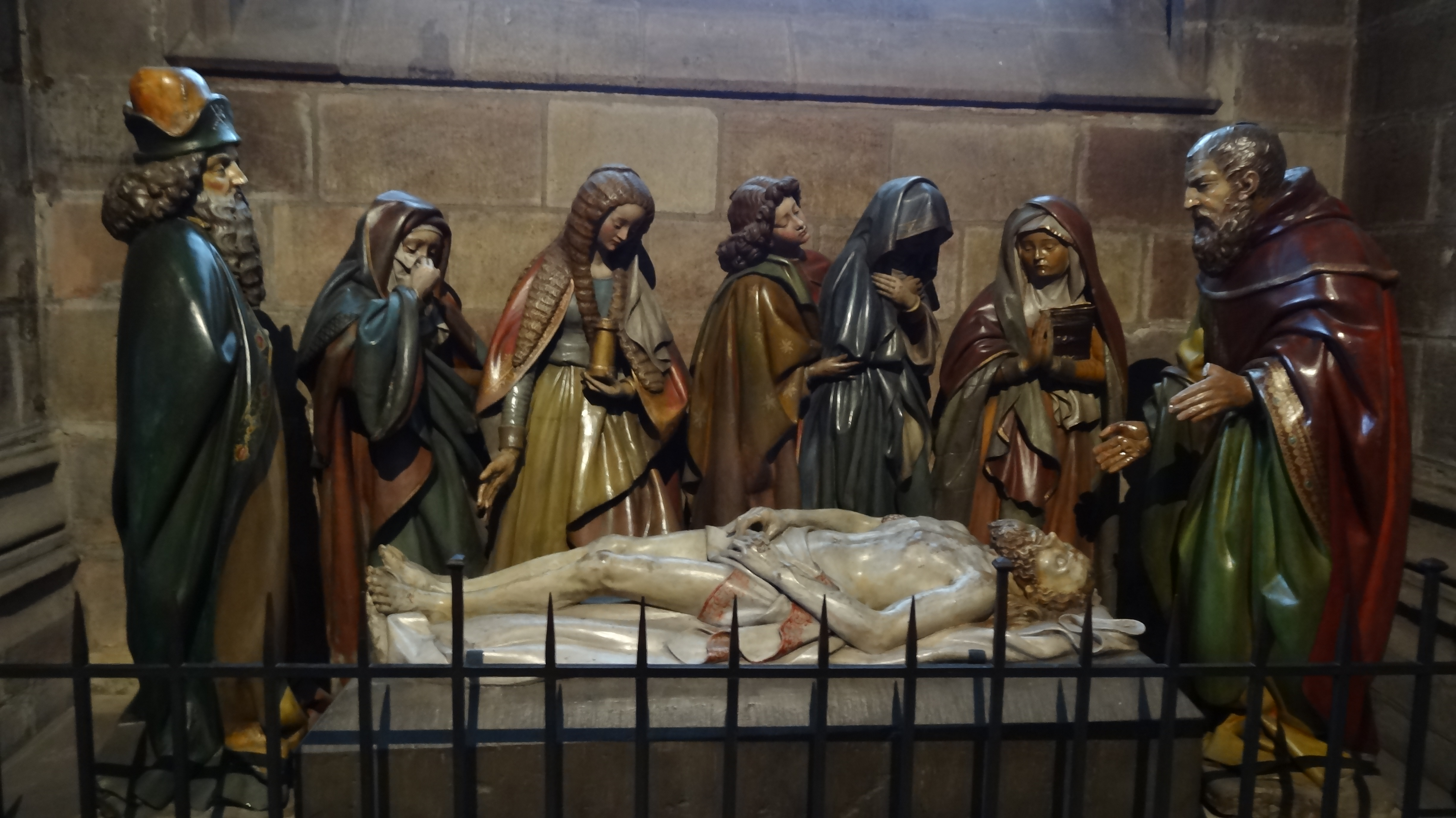 Le groupe de la «déploration du Christ», Cathédrale Notre-Dame-de-l'Annonciation de Moulins